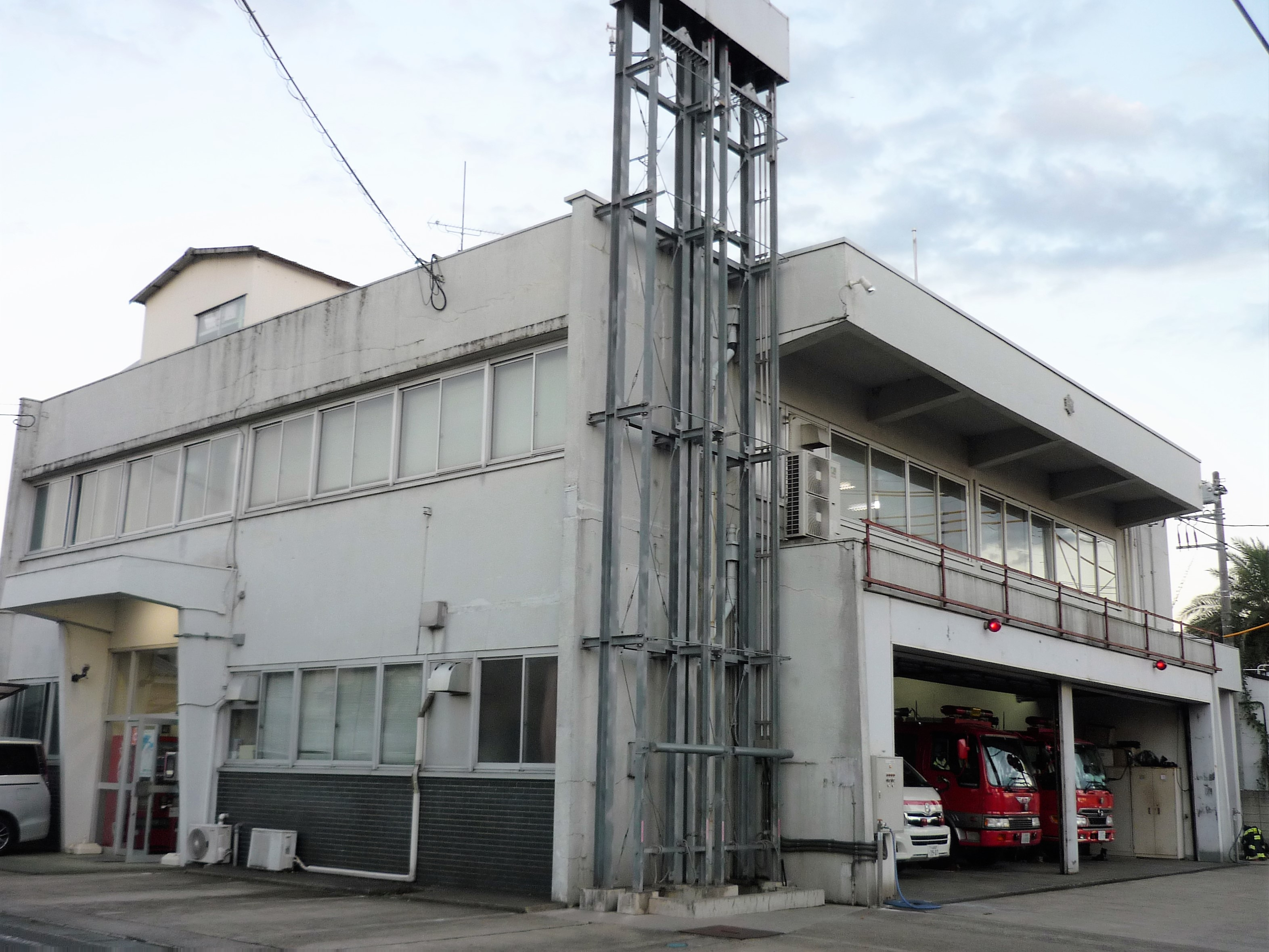 茨城西南地方広域市町村圏事務組合 下妻消防署